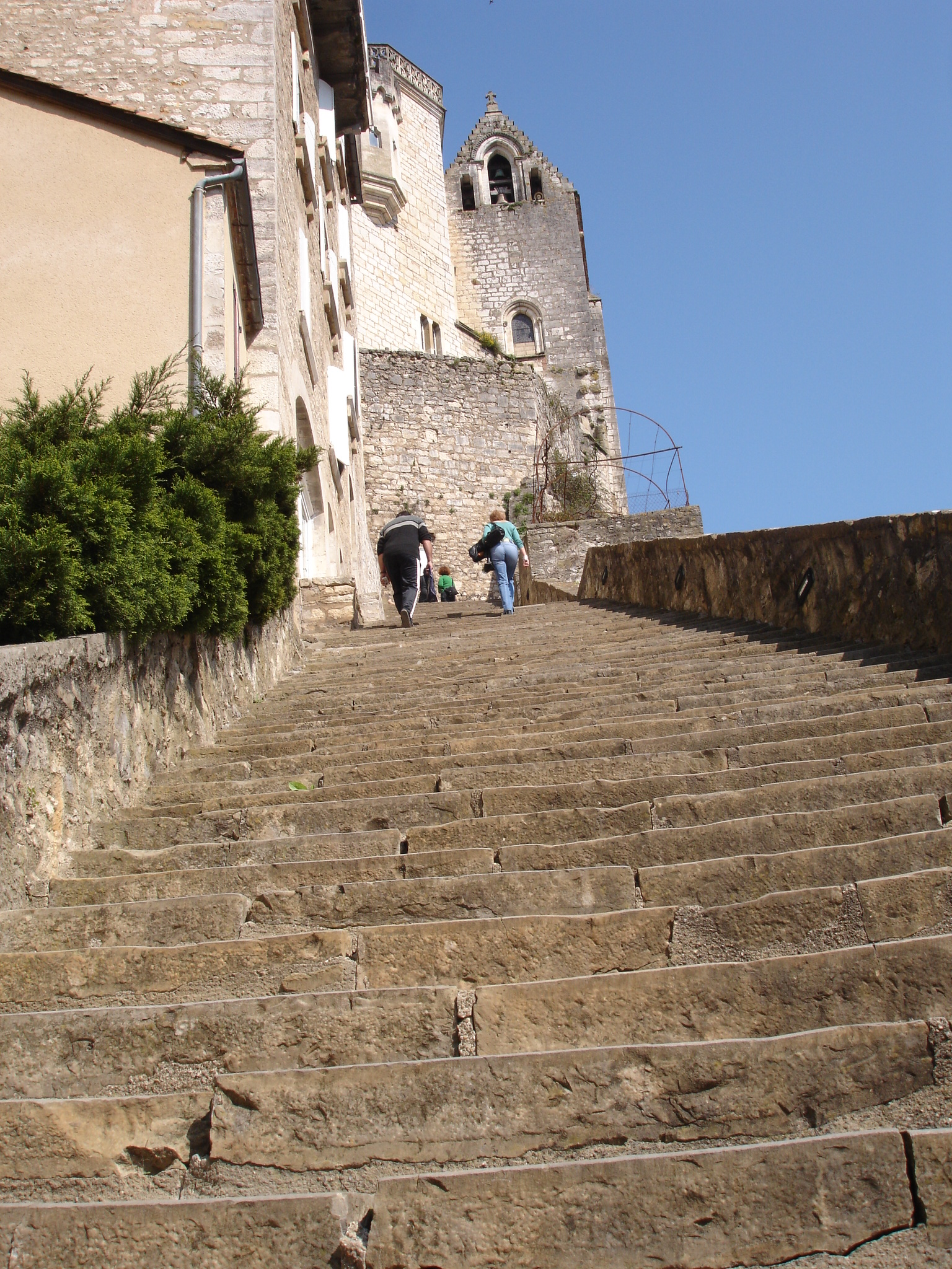 France, Lot (46), Rocamadour, grand escalier